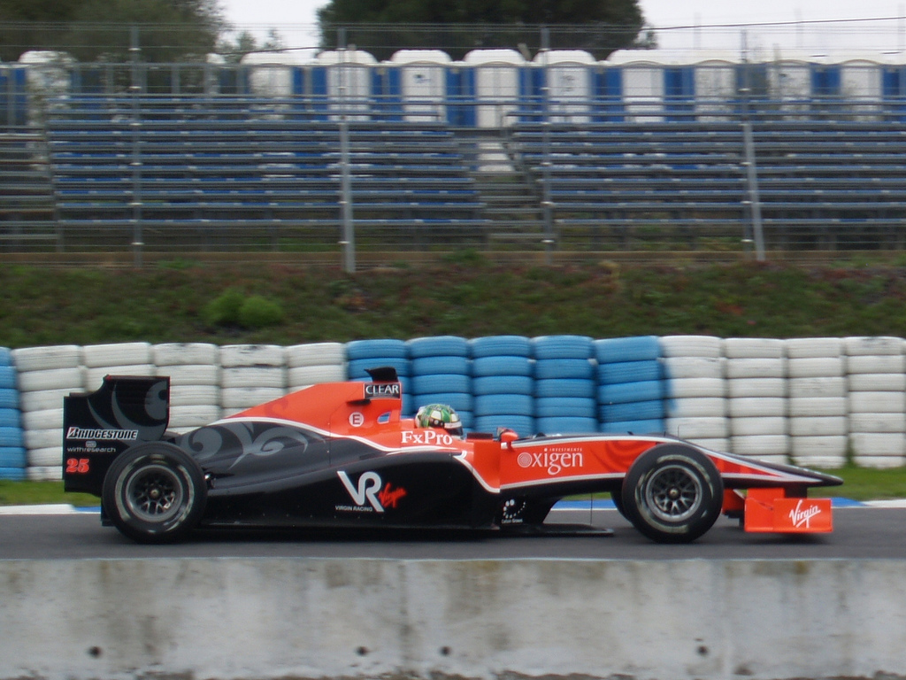 Virgin Racing Luca di Grassi